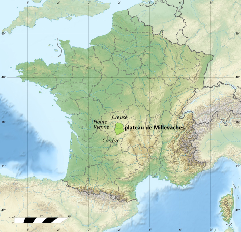 Localisation du plateau de Millevaches, sur une Carte physique de la France, avec régions et départements. Échelle approximative : 1:3 000 000